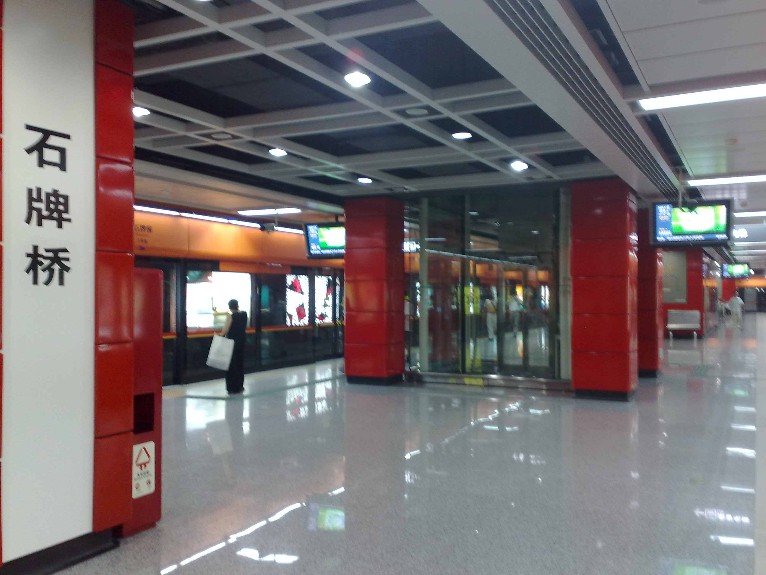 中文（香港）: 廣州地鐵石牌橋站月台